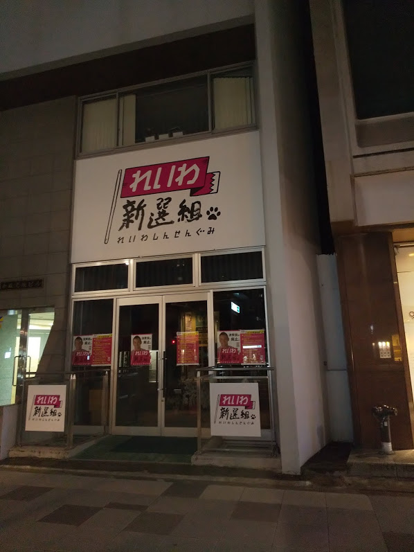 2019年9月22日撮影、れいわ新選組の赤坂の事務所